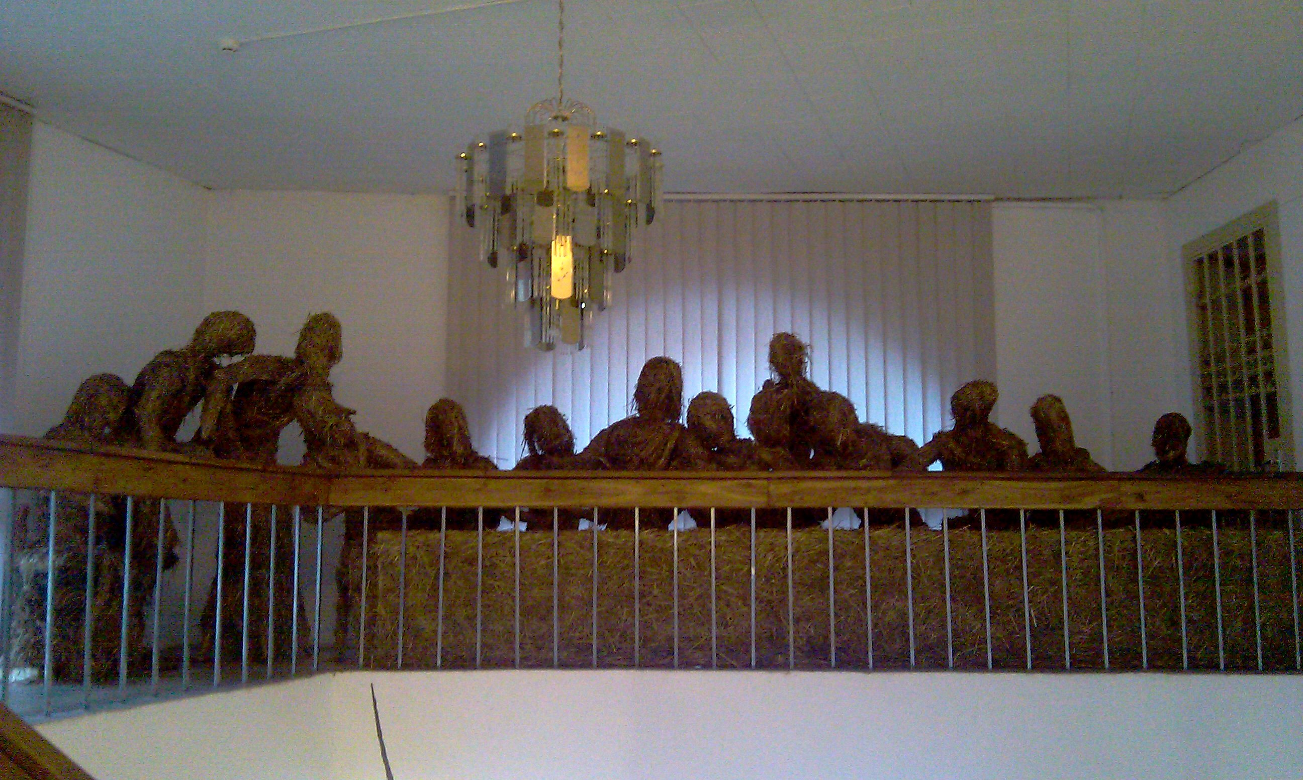 Белорусская "Тайная вечеря" из соломы, представленная в 2011 году на Венецианской Биеннале. Автор - Артур Клинов. Фото из Музея Современного изобразительного искусства в Минске.